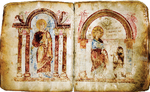 ჯრუჭის პირველი ოთხთავი